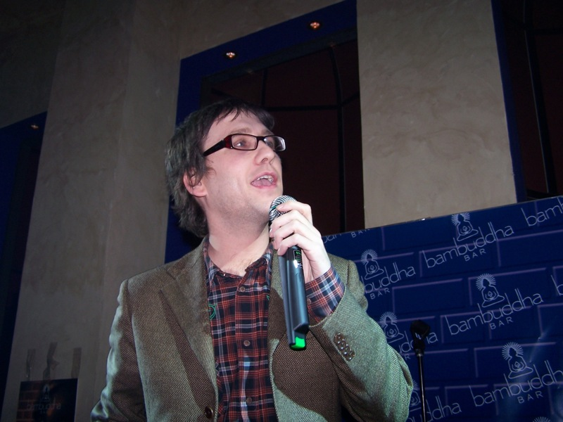 El humorista español Joaquín Reyes